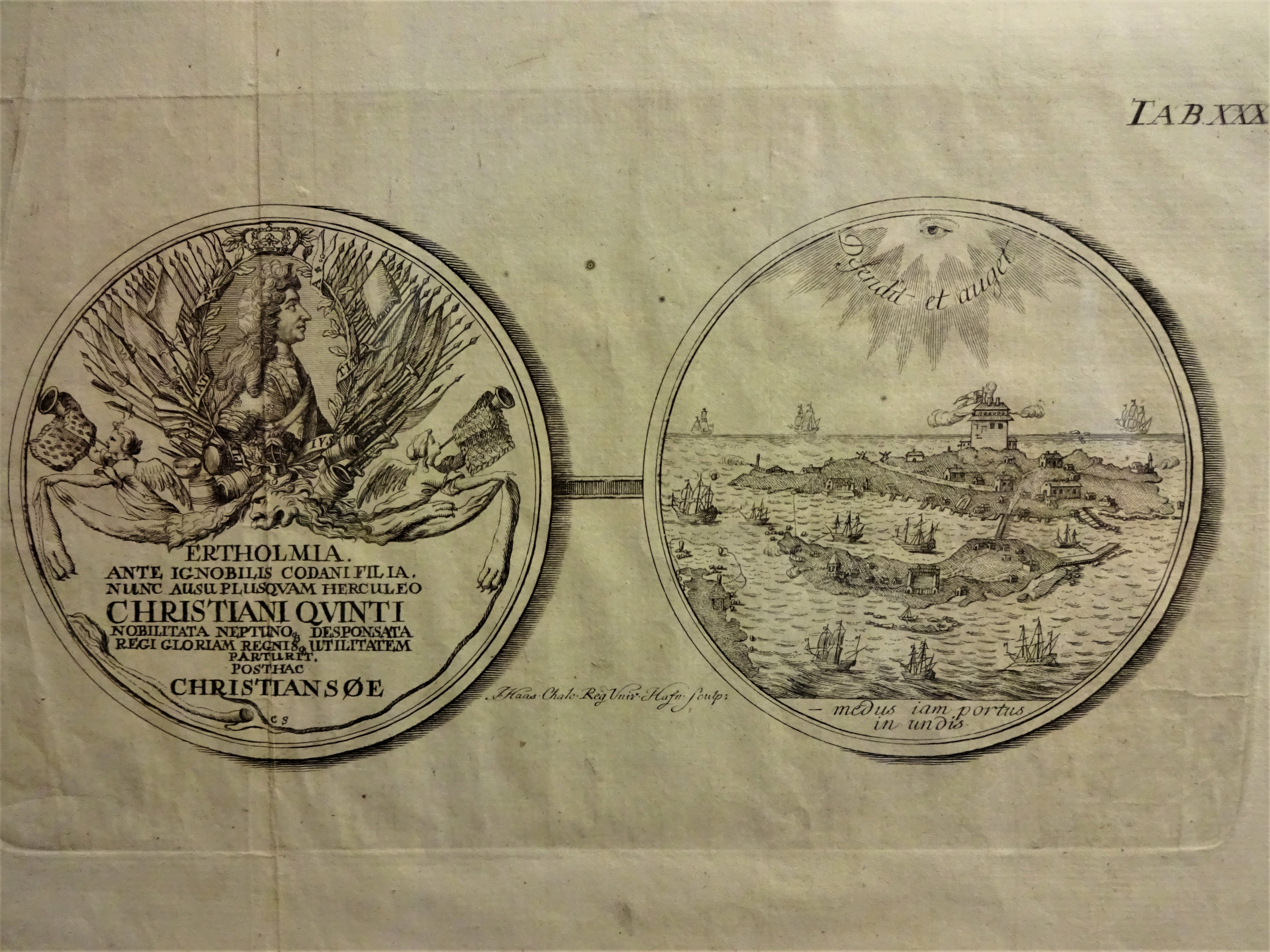 Abbildung einer Medaille Ertholmia z.Zt. Christian V.